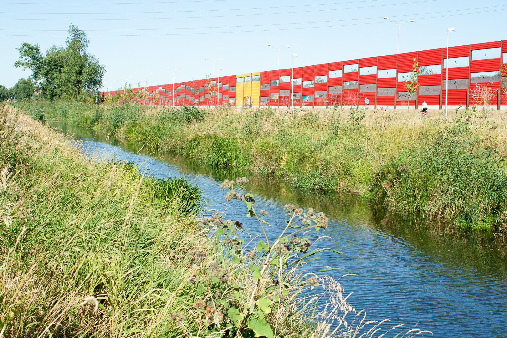 Kanał Nowa Ulga na skraju Osiedla Gocław w Warszawie, z prawej strony droga rowerowa, chodnik i ekrany antyakustyczne Trasy Siekierkowskiej, w głębi Most Siekierkowski.